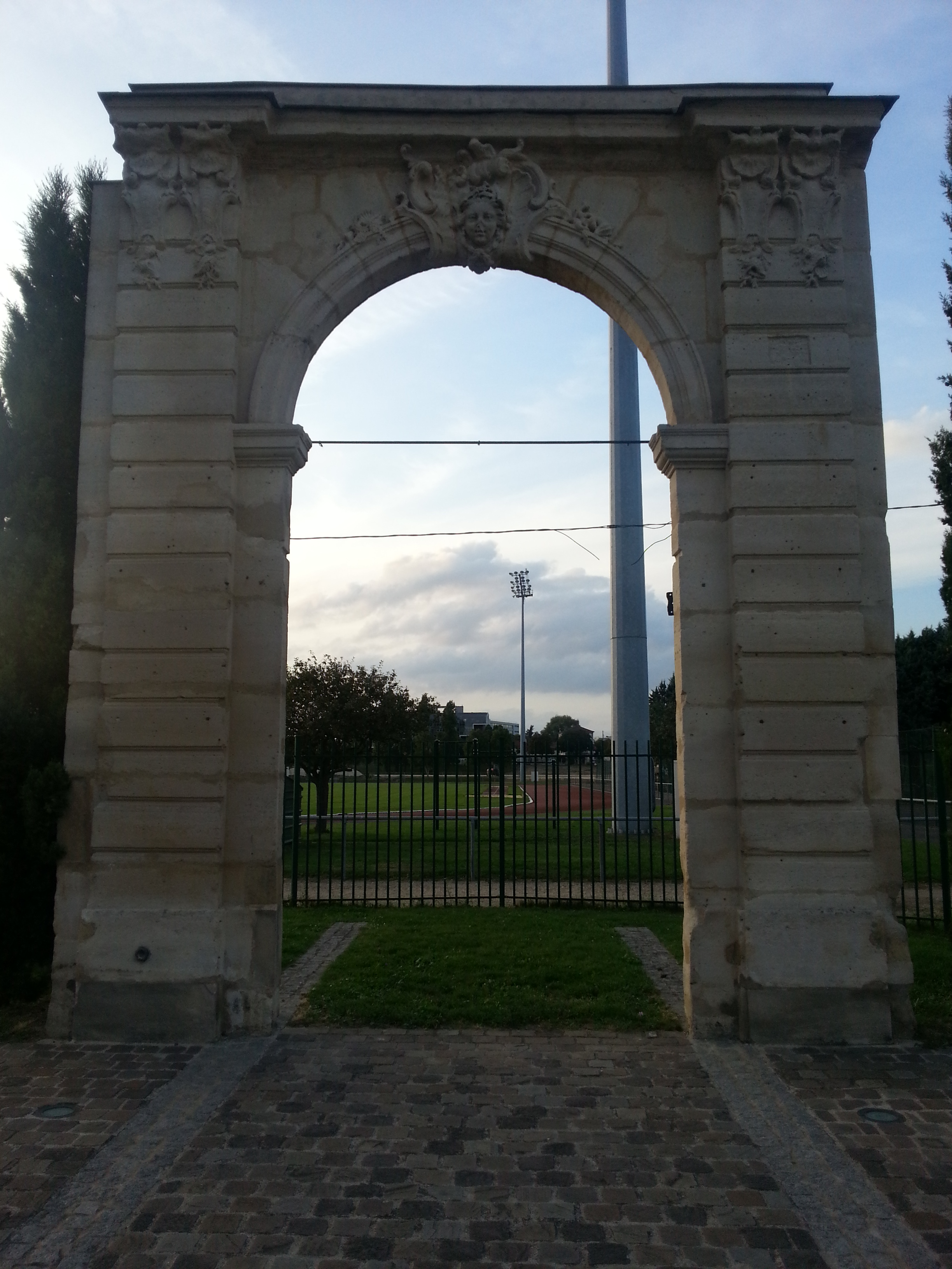 Porte du Château du Marais (Inscrit). Tout le reste a été détruit en 1969. .